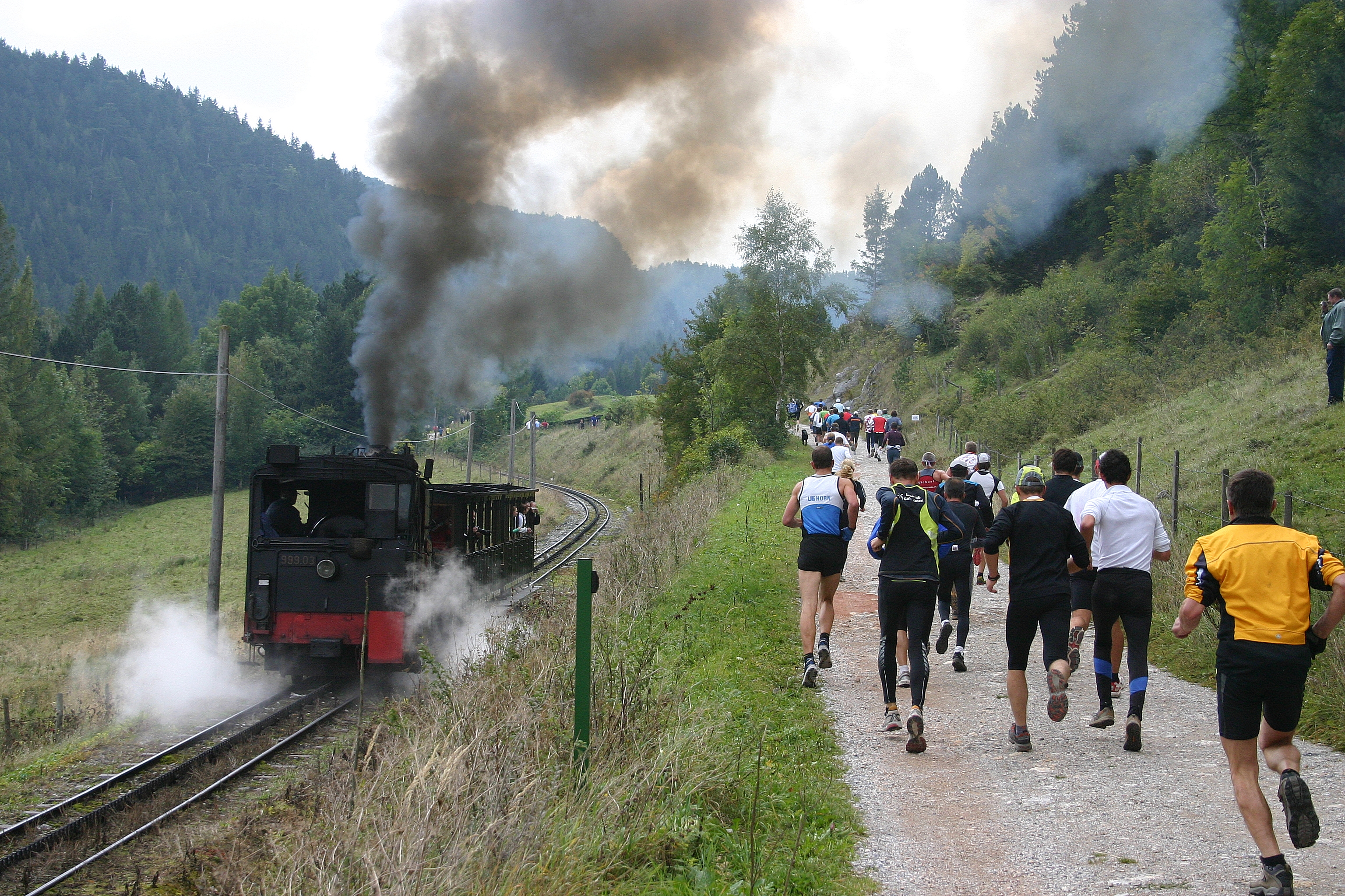 Schneeberglauf 2008 von Puchberg am Schneeberg auf den Hochschneeberg (Bild 2)